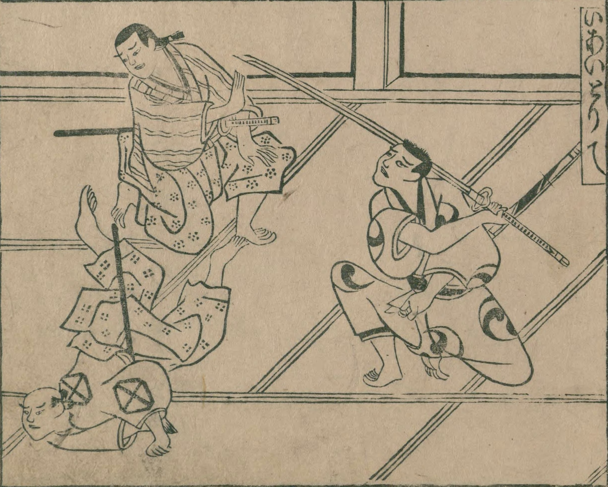 人倫訓蒙図彙7巻「いあいとりて」